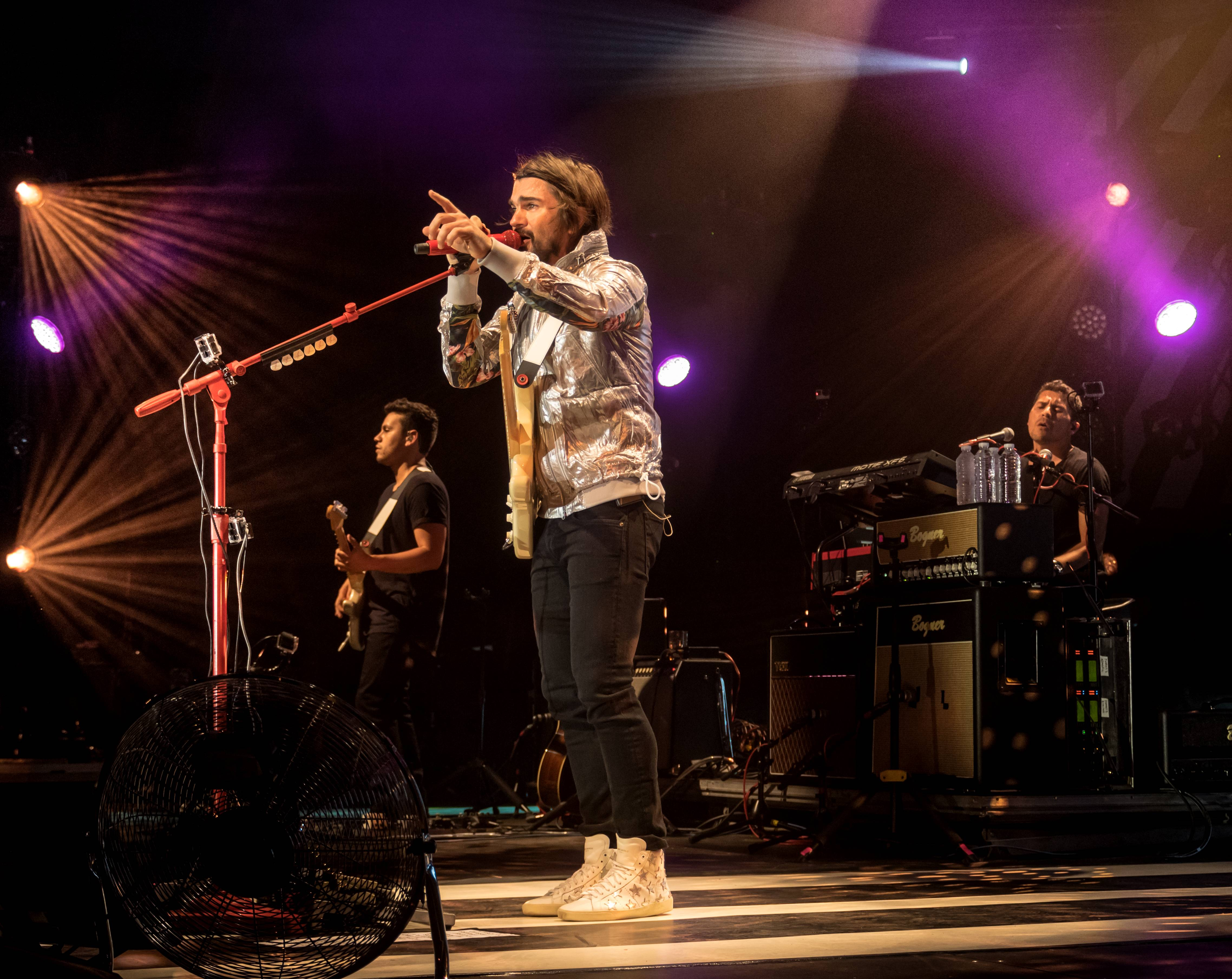 Bilder vom ZMF 2015 JUANES am 18. Juli 2015